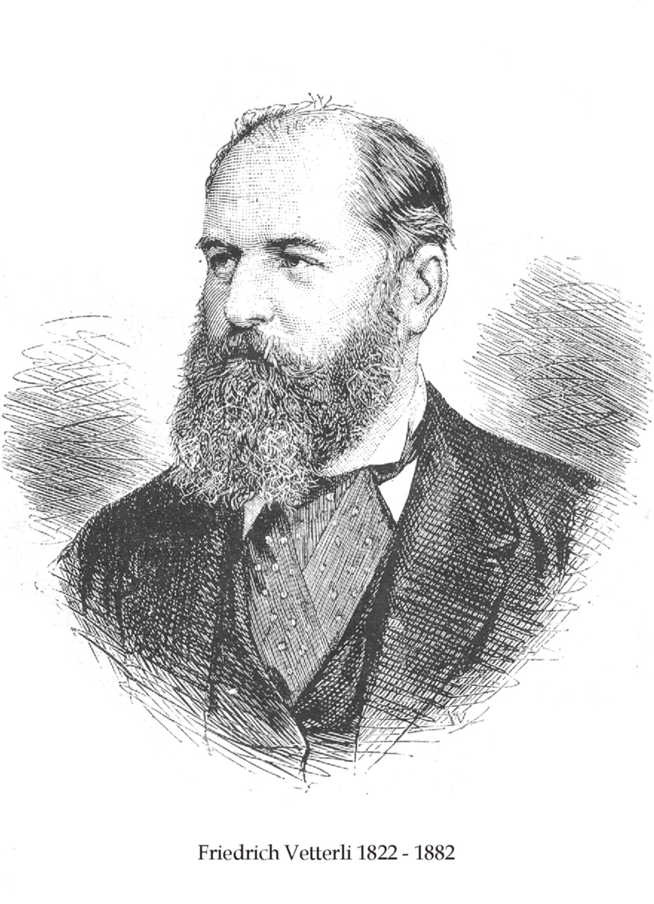 Portrait gravure de Friedrich Vetterli, armurier suisse, concepteur du fusil portant son nom